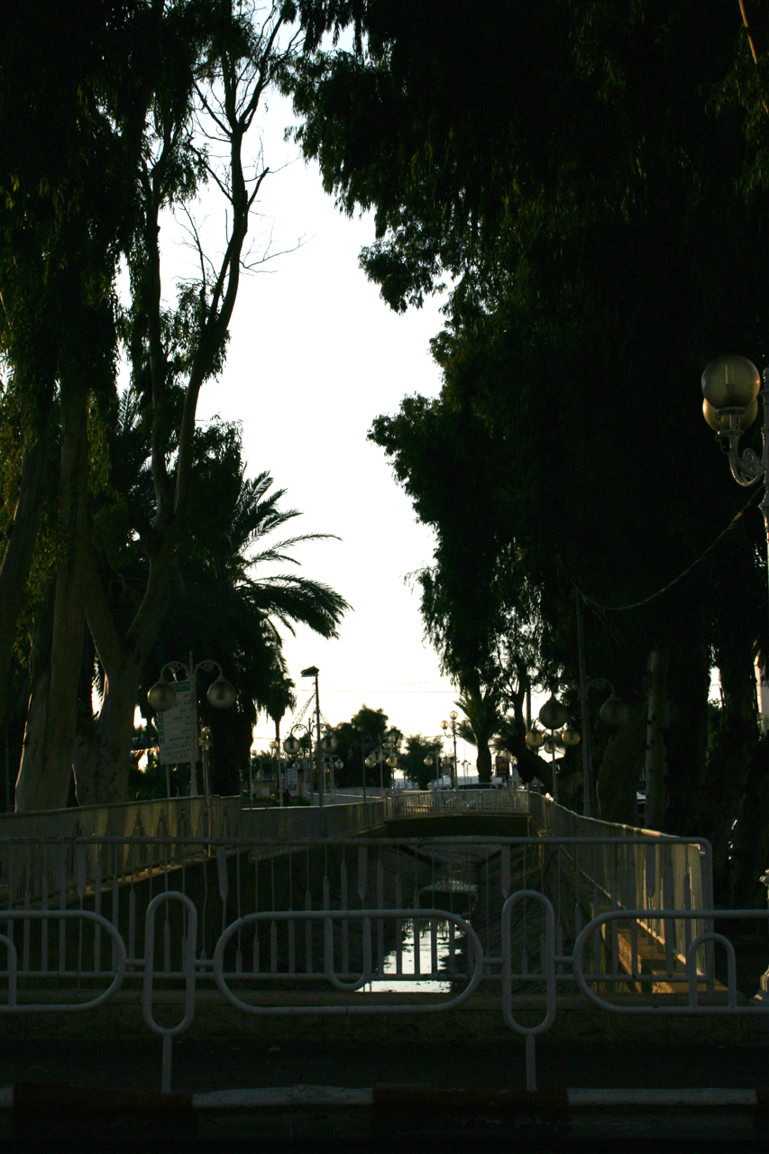 Nahariya - Riviere Ga'aton